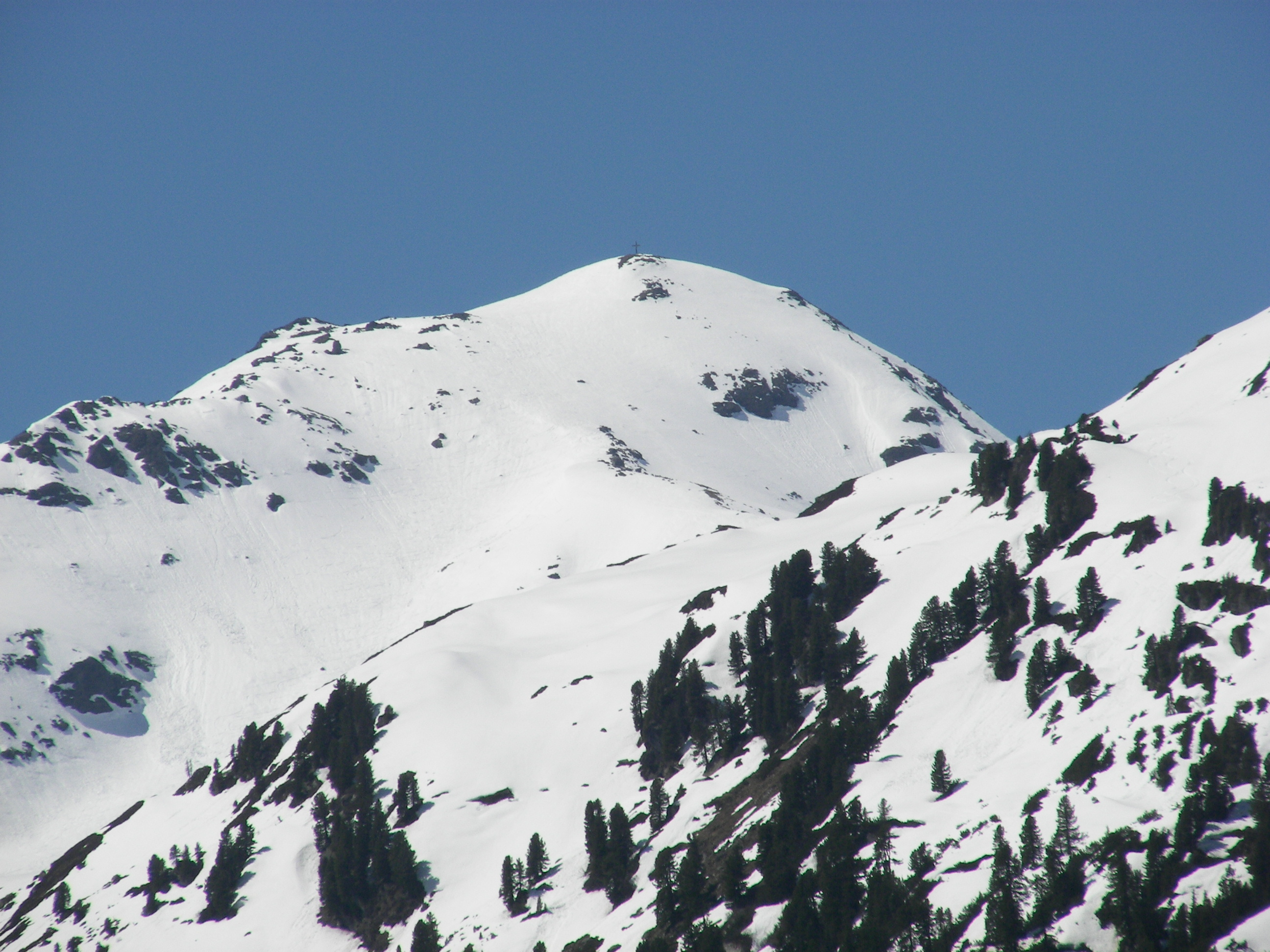 Torhelm von der Tiefentalalm in der Kelchsau aus gesehen